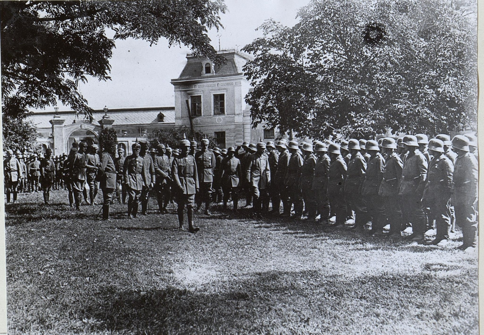 Besuch S.M.des Königs Friedrich August v.Sachsen 6.9.1917 in Chorostkow.